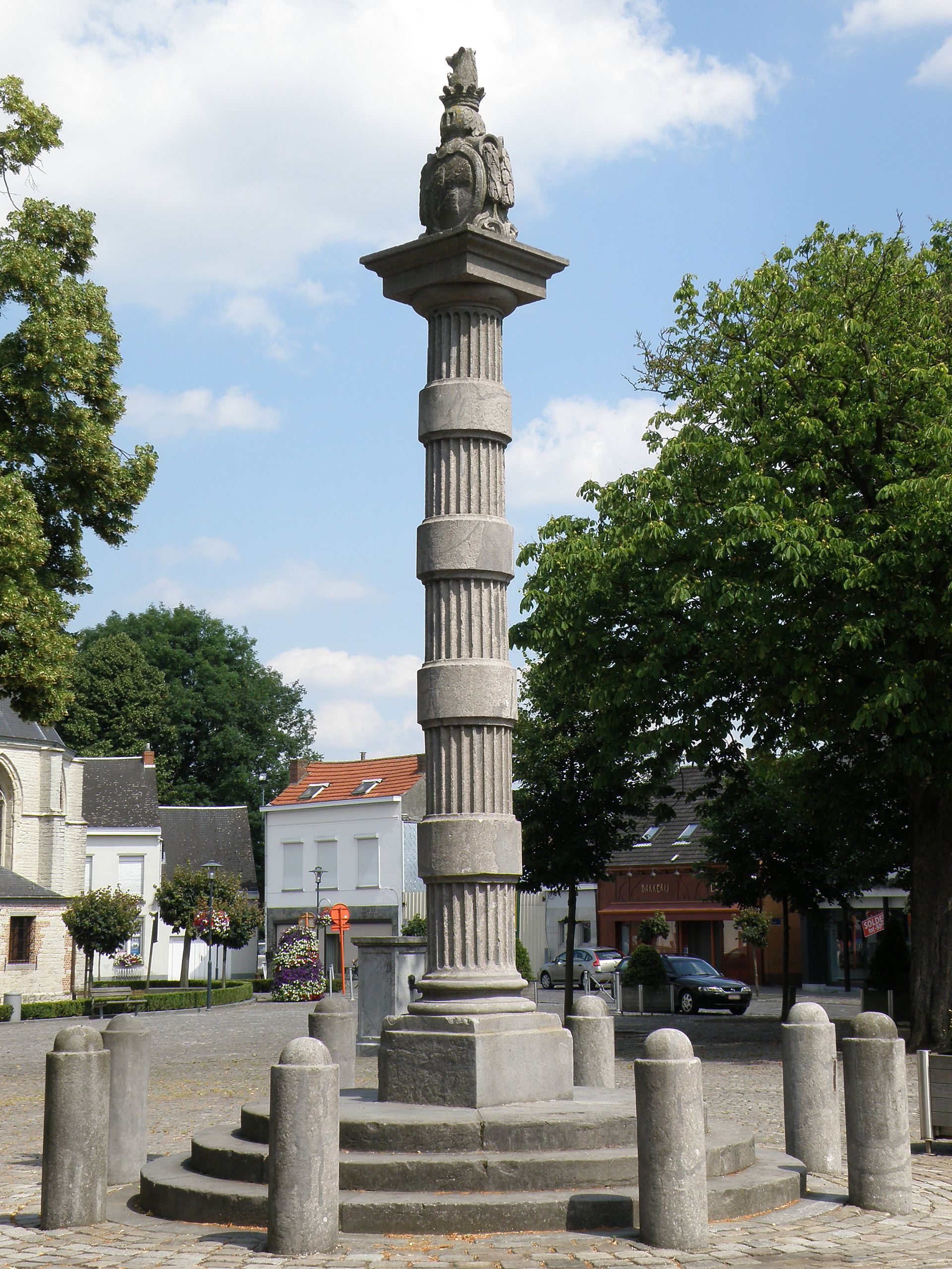 Wommelgem (prov. Antwerpen, België). Kaak (Kerkplaats).